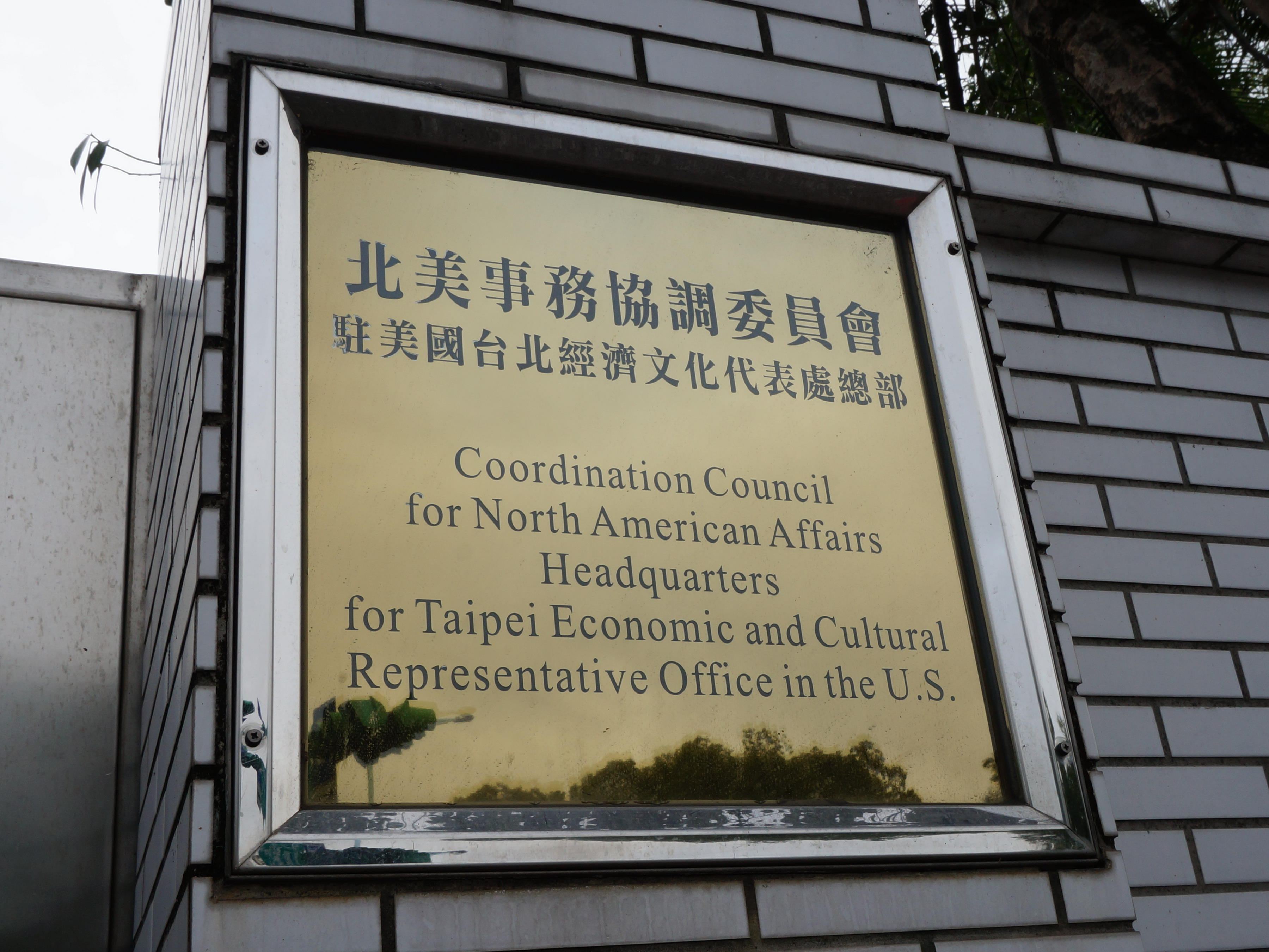 臺北市中正區博愛路133號，北美事務協調委員會大門銘板。